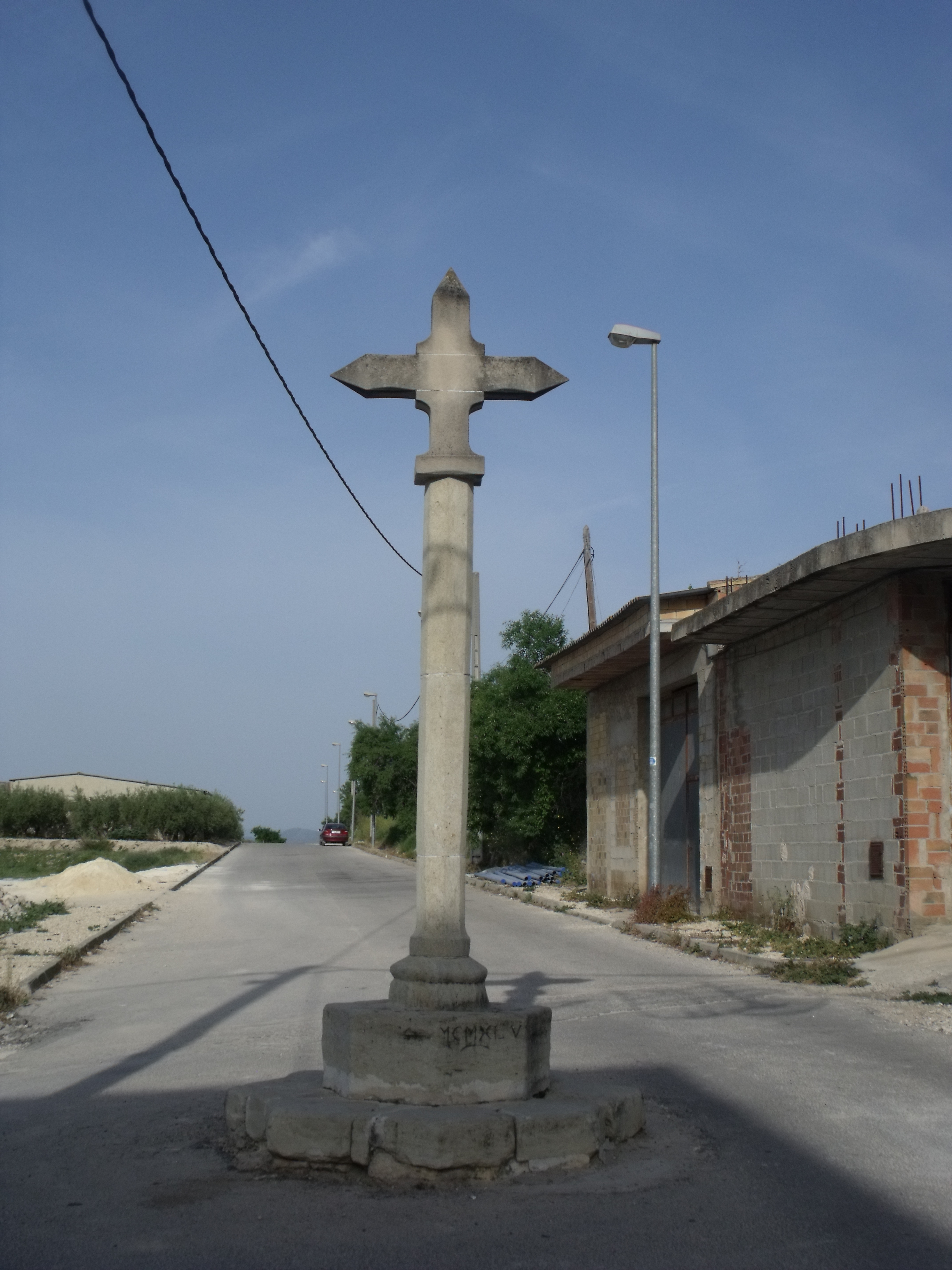 Cruz de término en Llutxent